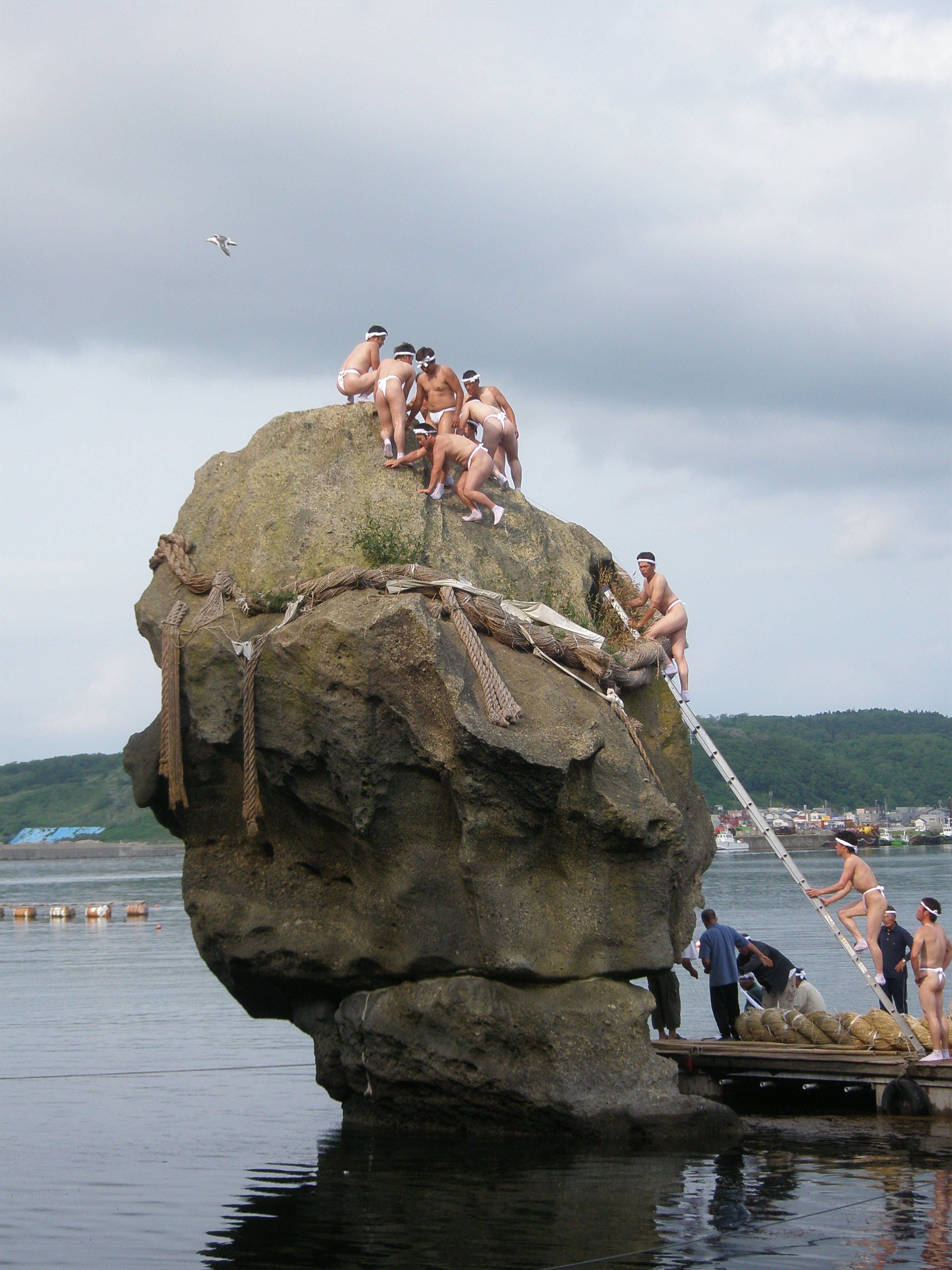 若衆が瓶子岩に上がる